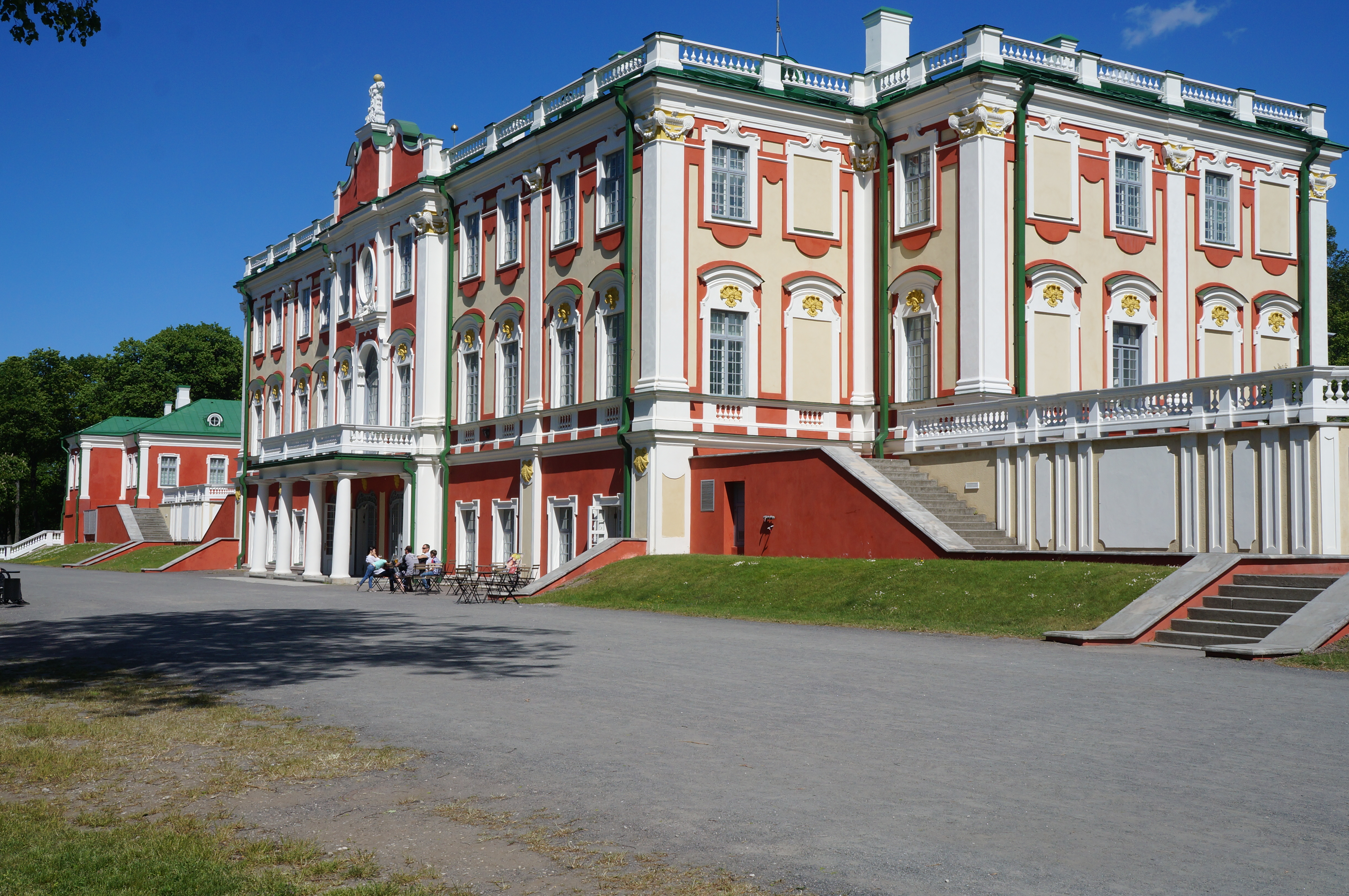 Kadriorg_Palace à Tallinn, Estonie.